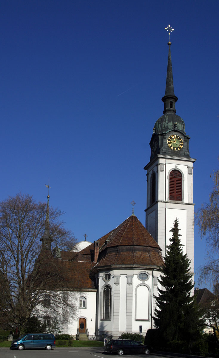 Katholische Kirche in Weinfelden